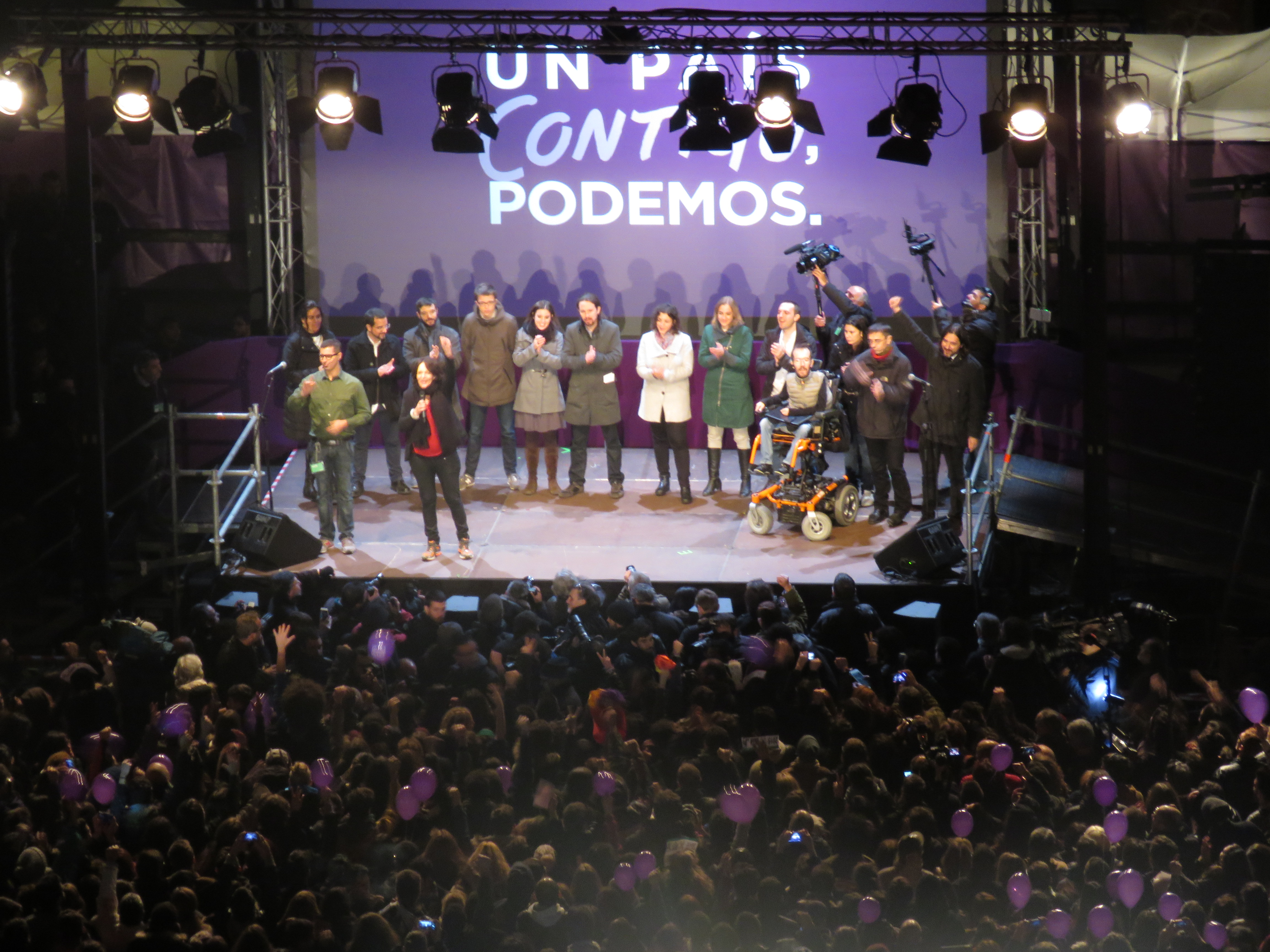 Imagen del recibimiento en el Reina Sofía tras conocerse el resultado electoral de las elecciones generales del 20 de diciembre de 2015, en las que Podemos consiguió 69 escaños.